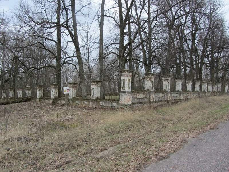 Агароджа былой царквы ў вёсцы Вылева